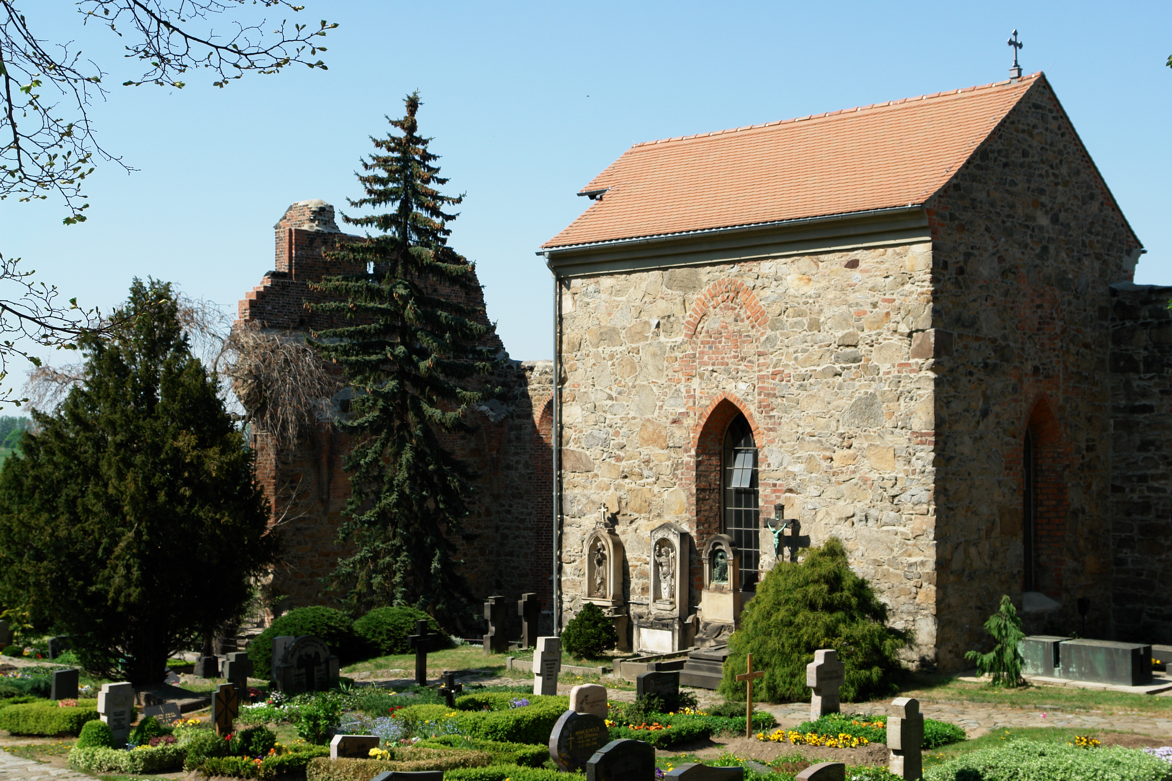 Friedhof an der St.-Nikolai-Kirche in Bautzen in Sachsen, Deutschland. Hornjoserbsce: Kěrchow na Budyskim Mikławšku